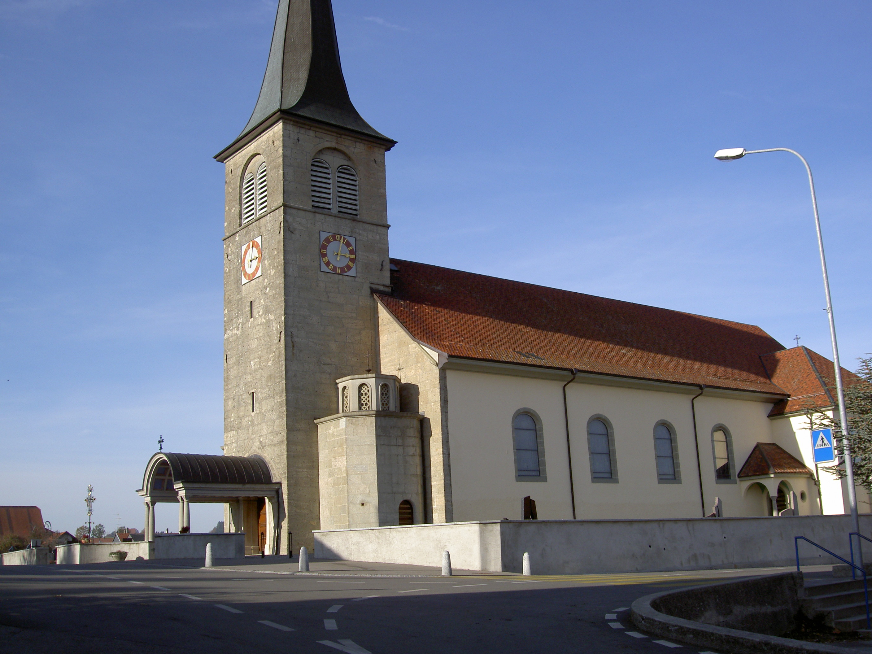 Eglise paroissiale de Siviriez